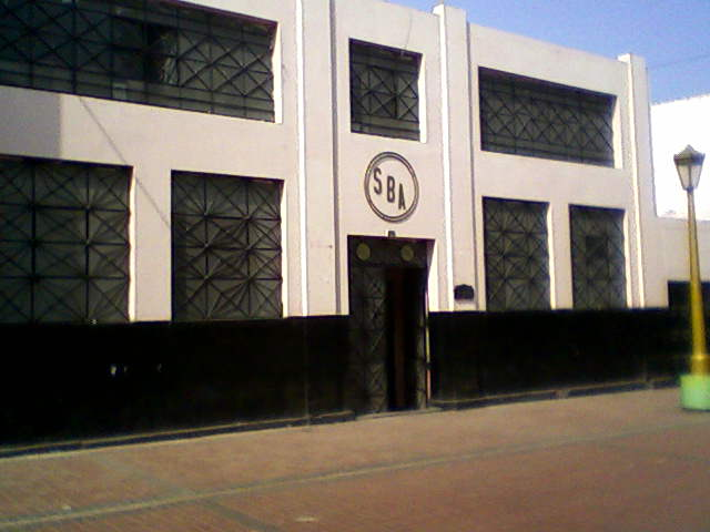 Local del club Sport Boys Association